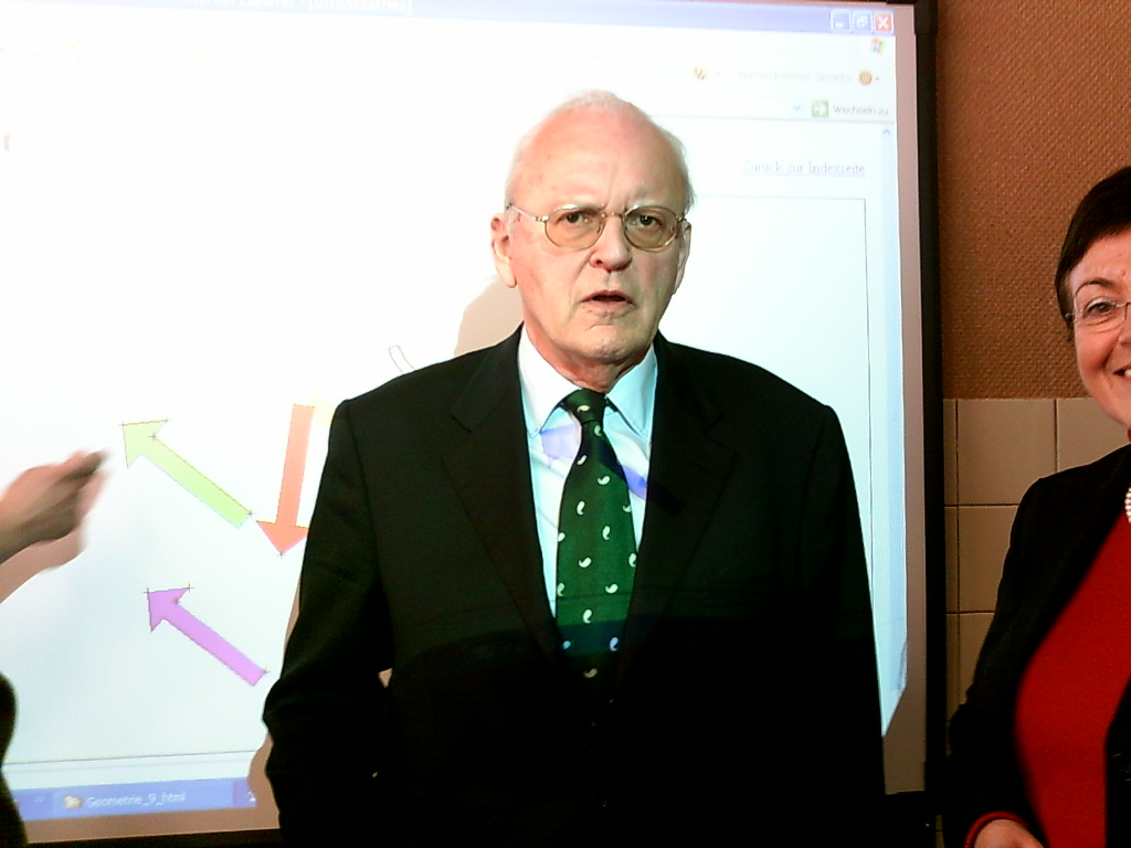 Roman Herzog (1934–2017), deutscher Jurist und Politiker, Bundespräsident von 1994 bis 1999